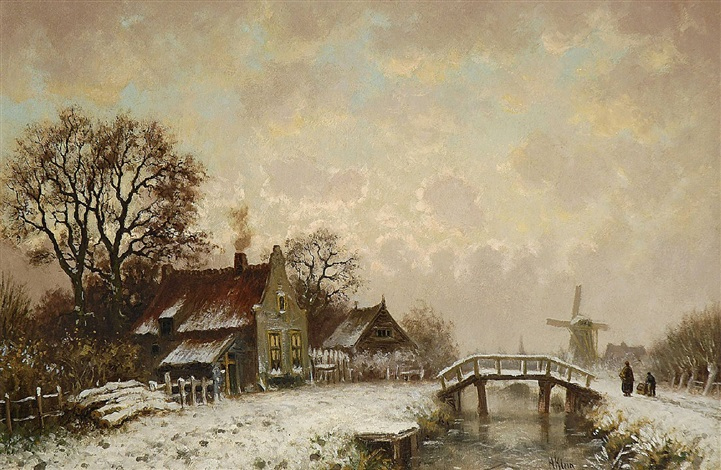 Winterlandschaft mit Häusern und Windmühle am Bach